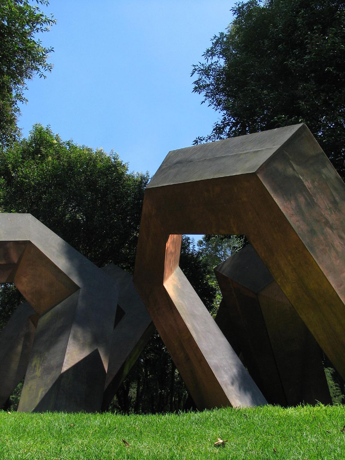 Museo de Arte Moderno - México